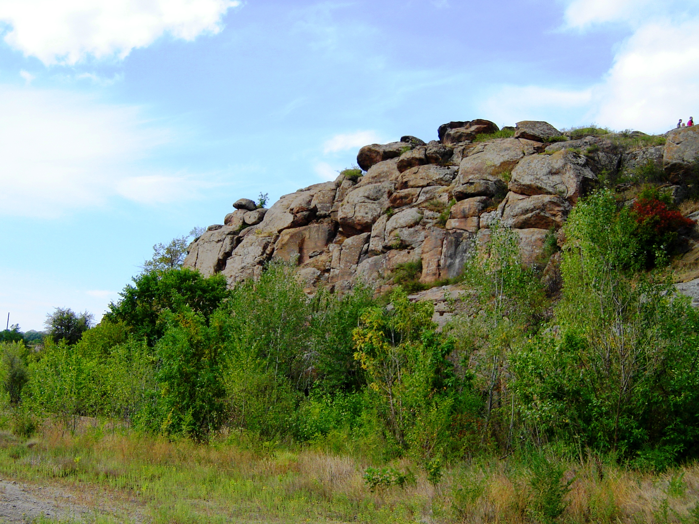 Кряж над Південним Бугом / Ridge over Southern Bug